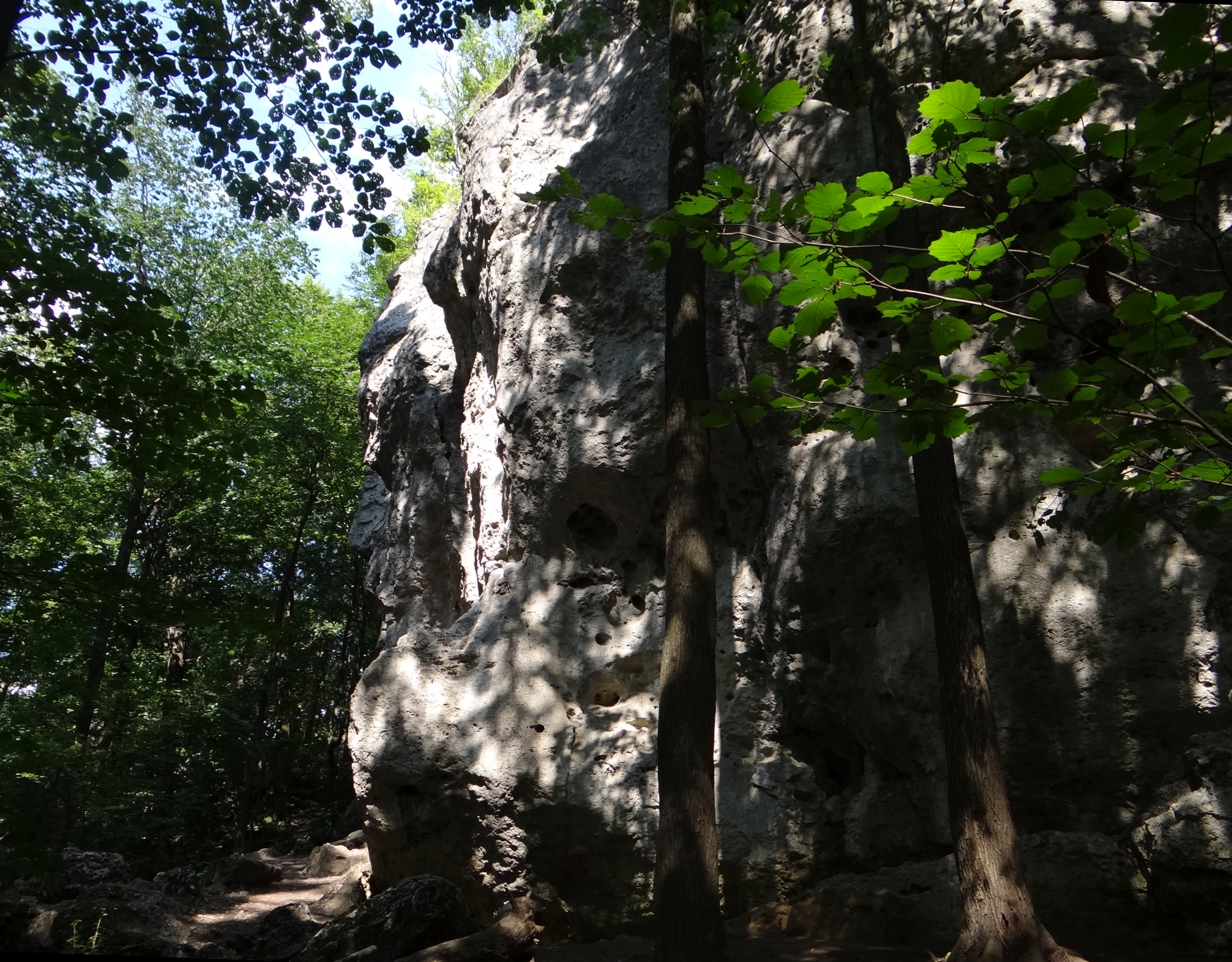 Skała Diabelski Mosty w Złotym Potoku